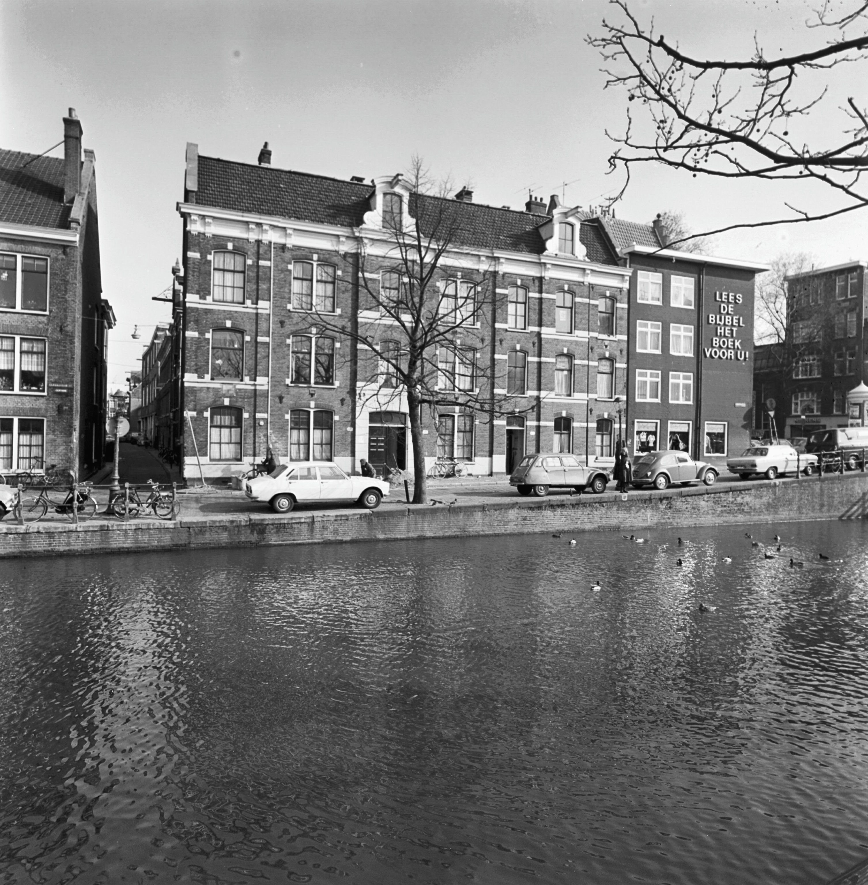 voorgevels, v.l.n.r. Lijnbaansgracht 180-181, de Lijnbaansstraat, Lijnbaansgracht 182, Elandsgracht 148